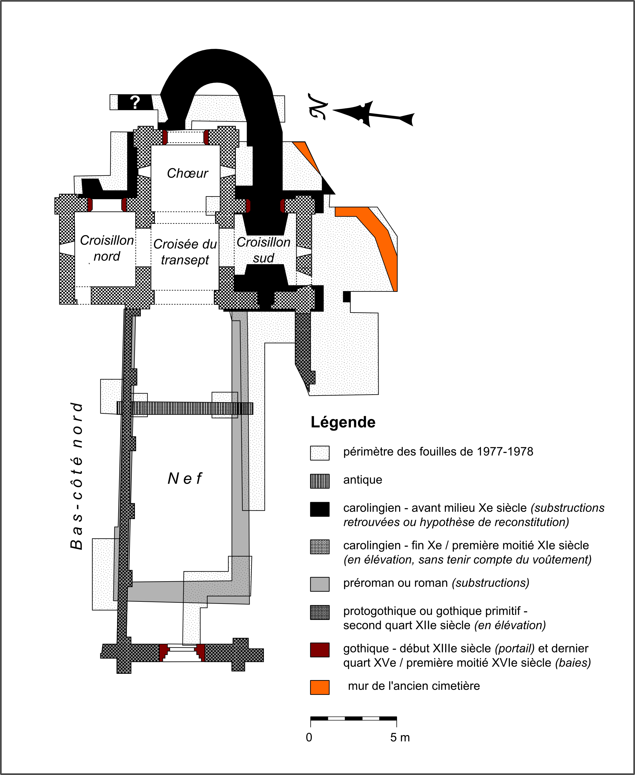 Plan de l'église ruinée actuelle avec les substructions de la nef romane et du précédent choeur carolingien.